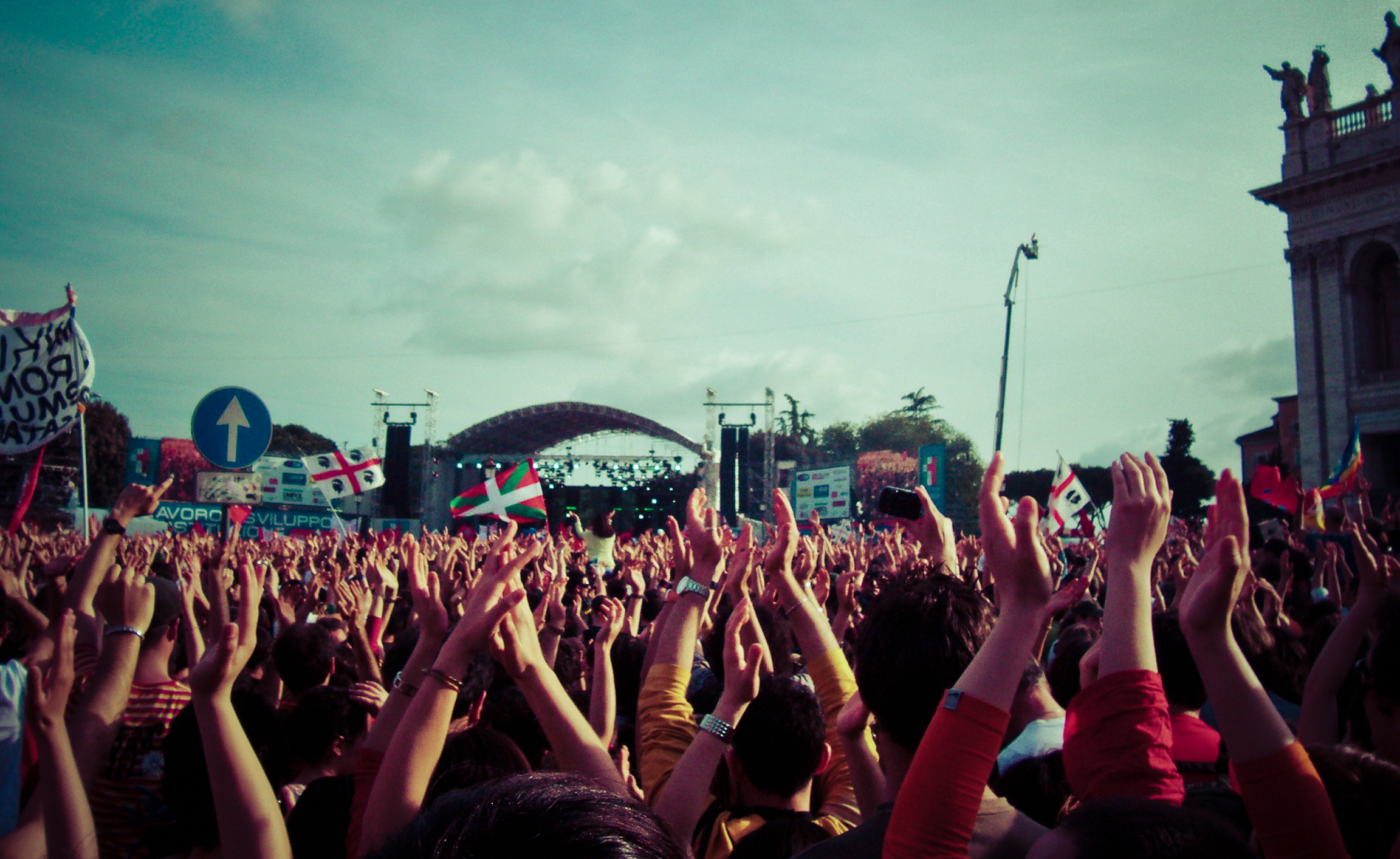 Festa del lavoro (inesistente) Roma, concerto del primo maggio. Quando non si parlava di crisi, se ne gettavano le premesse.